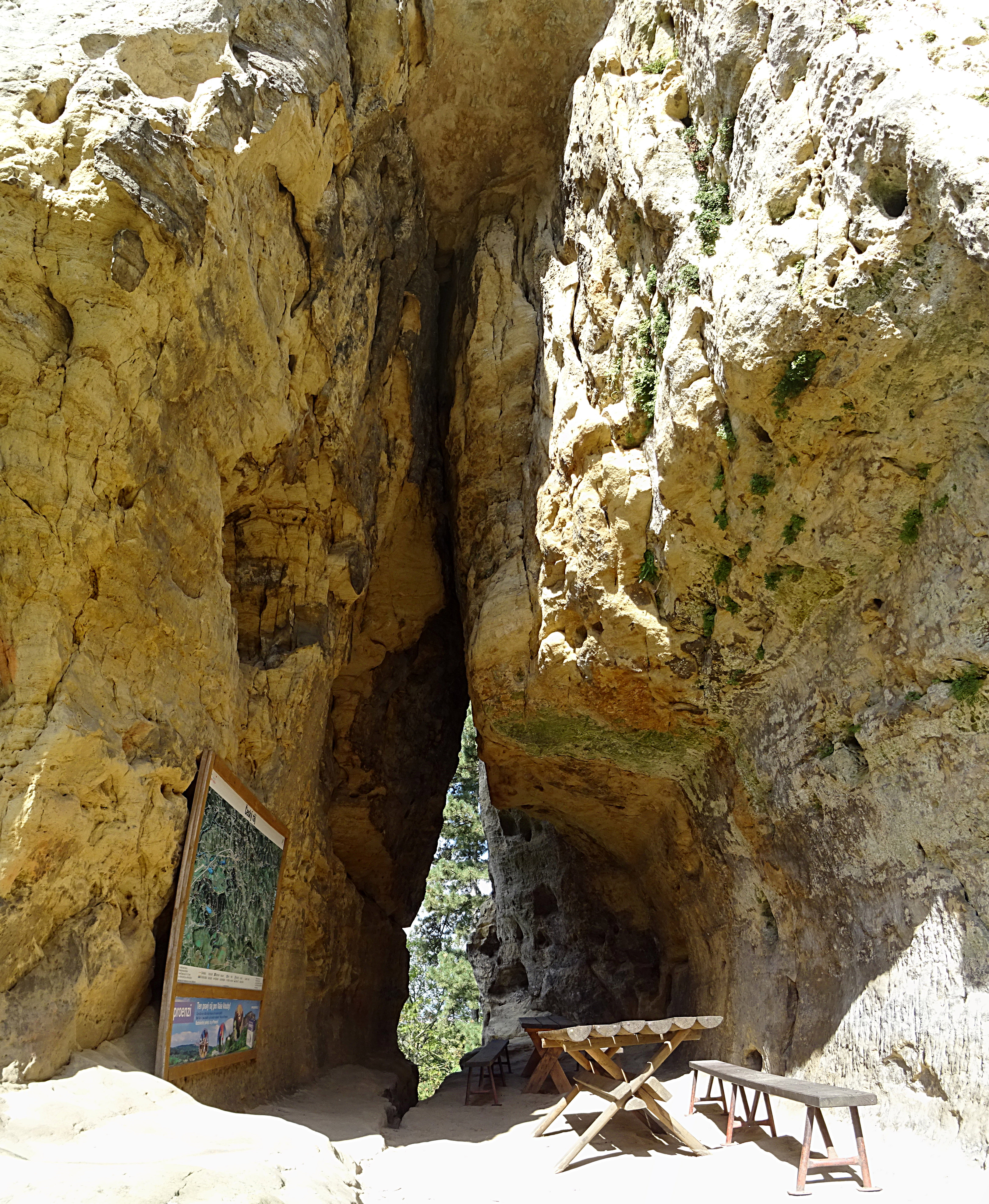 ältester Teil der Felsenburg Valečov